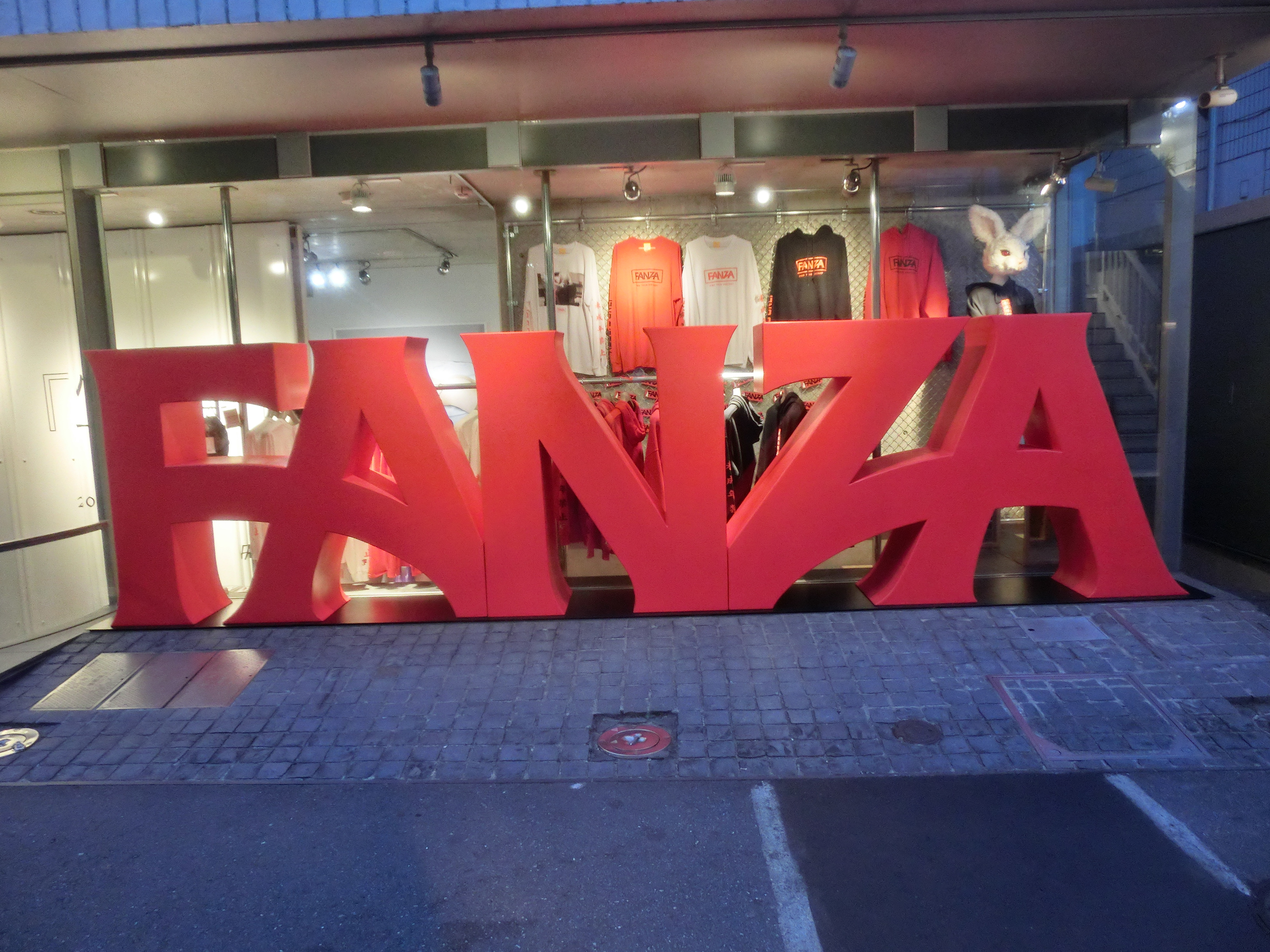 FANZA × #FR2 @#FR2 GALLERY 2（2018年9月）